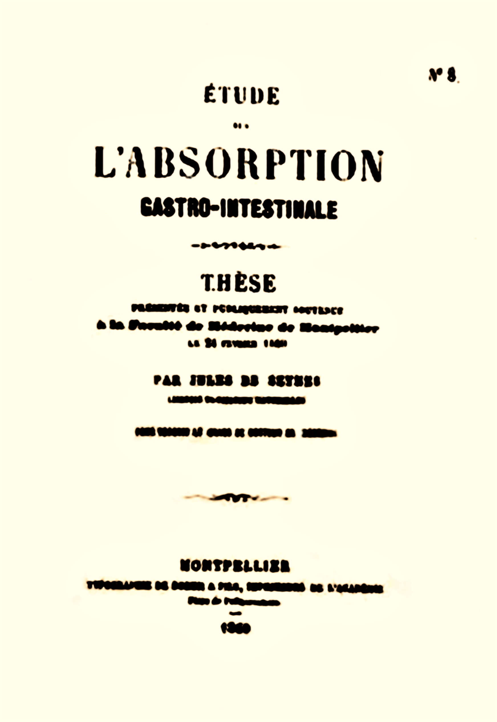 Jules de Seynes: Étude sur l'absorption gastro-intestinale, Ed. Ricard frères, Montpellier 1860, 1. Doktorarbeit